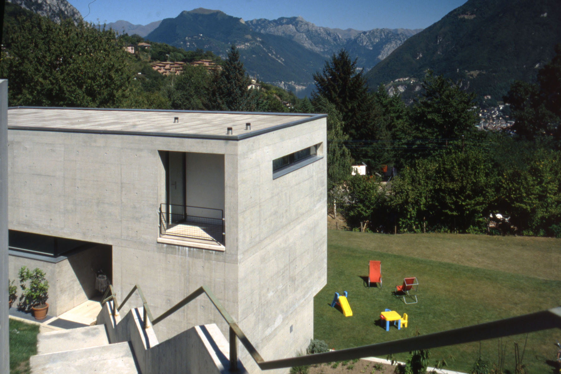 Carona, Casa Bernasconi, arch. Luigi Snozzi 1989-90